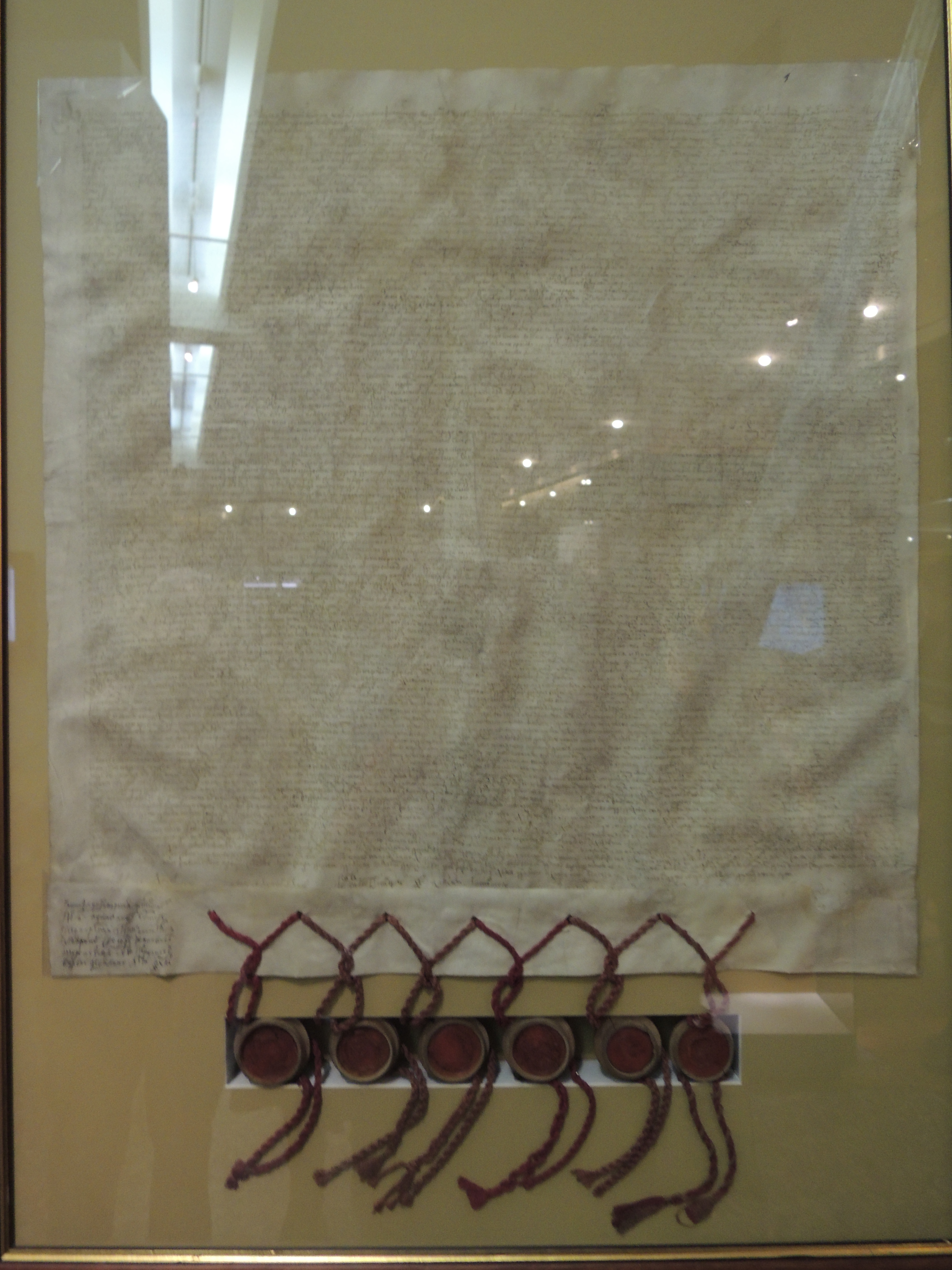 11 декабря 1618 года. Договор между Россией и Польшей о перемирии на 14 лет, возвращении Польше Смоленска, размене пленными и проч., заключенный в деревне Деулино. РГАДА. Ф. 79. Сношения России с Польшей. Оп. 3. №58. Оригинал на пергамене. Подписан шестью польскими послами с приложением их печатей. Выставка "Романовы. Начало династии", приуроченная к 400-летию избрания на царство Михаила Федоровича Государственный Исторический музей, весна 2013 года